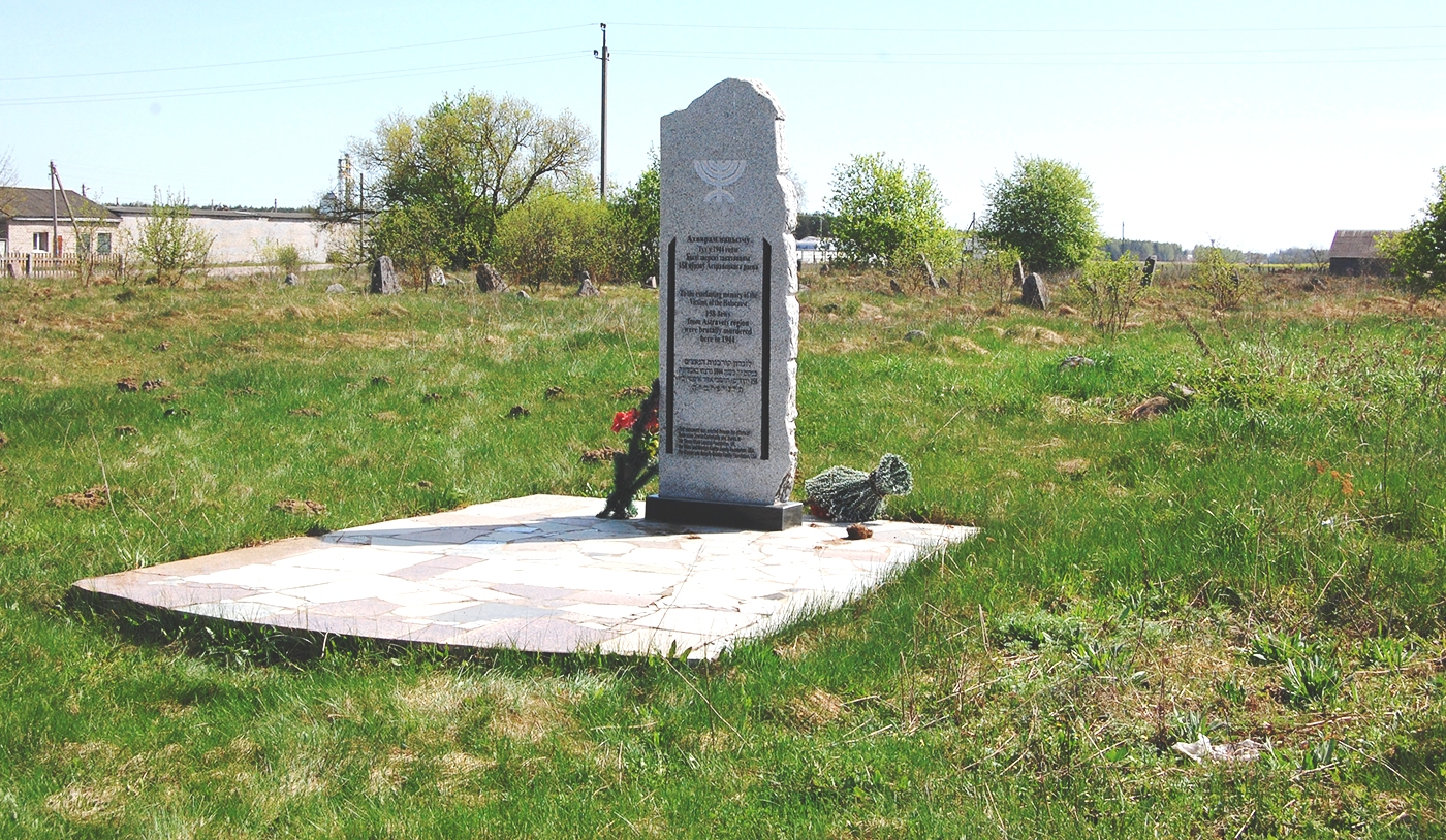 Памятник убитым во время Холокоста евреям в деревне Михалишки Островецкого района. Установлен 22 июня 2009 года на старом еврейском кладбище.